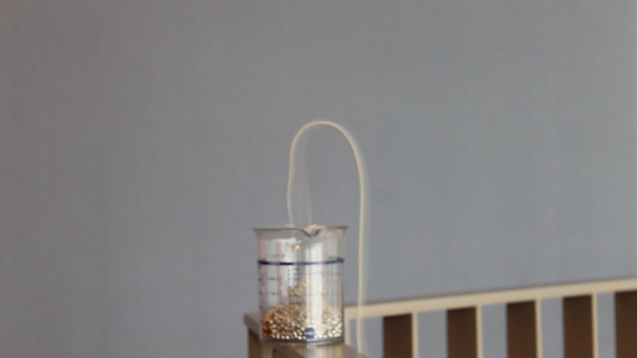 Momentaufnahme der Kettenfontäne